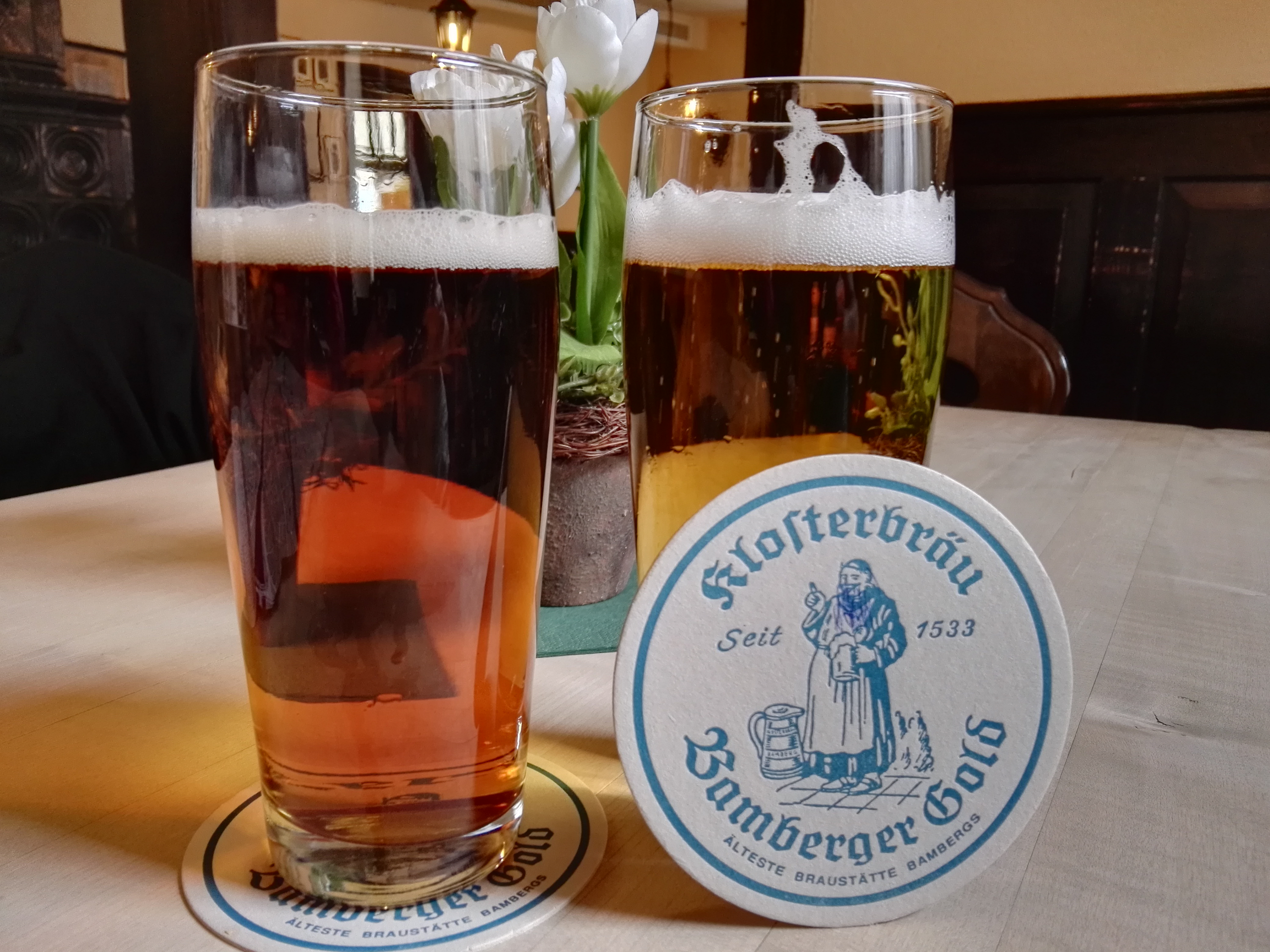 Bockbier der Brauerei Klosterbräu in Bamberg